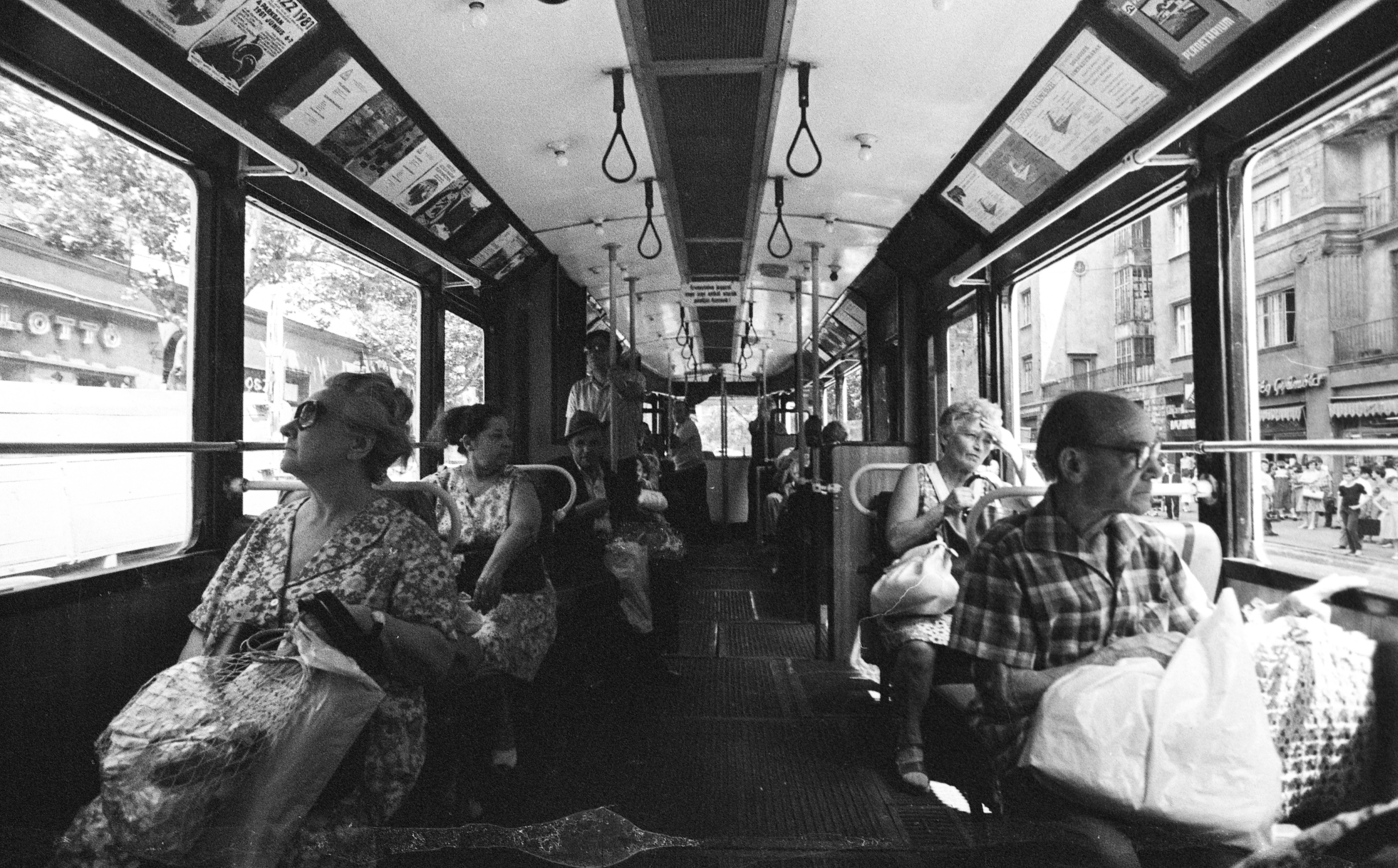 Budapest XI., Bartók Béla út. Ganz UV villamos utastere